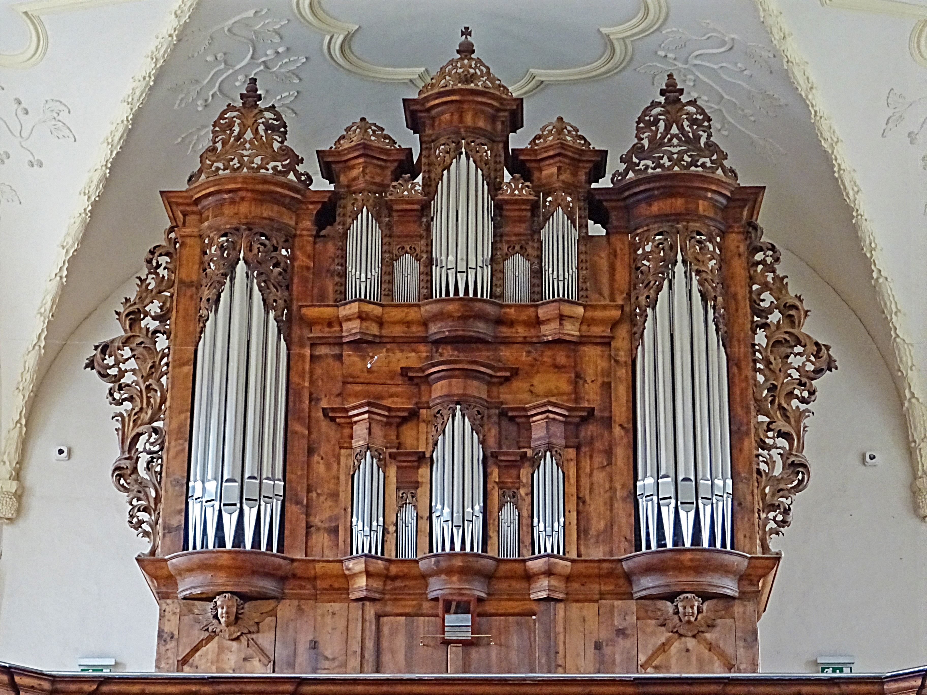 Orgel von Ernst Röver (1901, II/P30) in St. Blasii (Quedlinburg)[1]